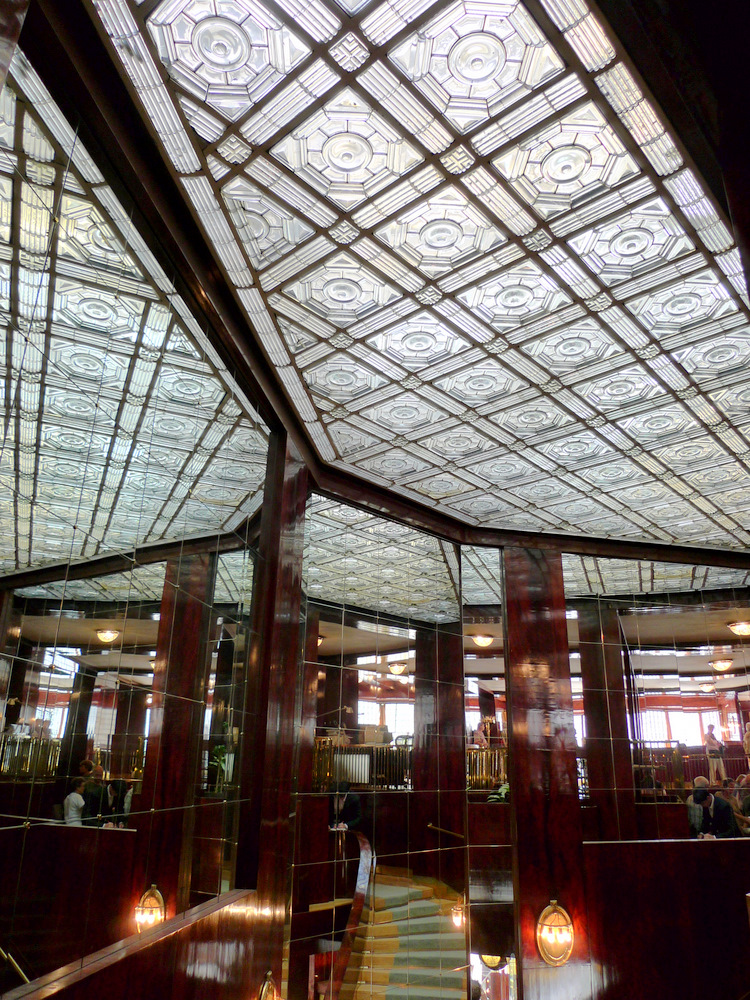 Looshaus, Haus Goldman & Salatsch